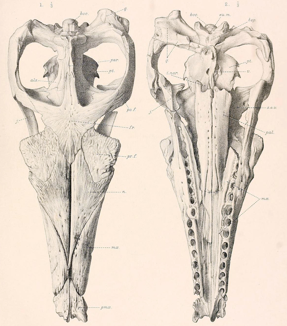 Suchodus brachyrhynchus skull